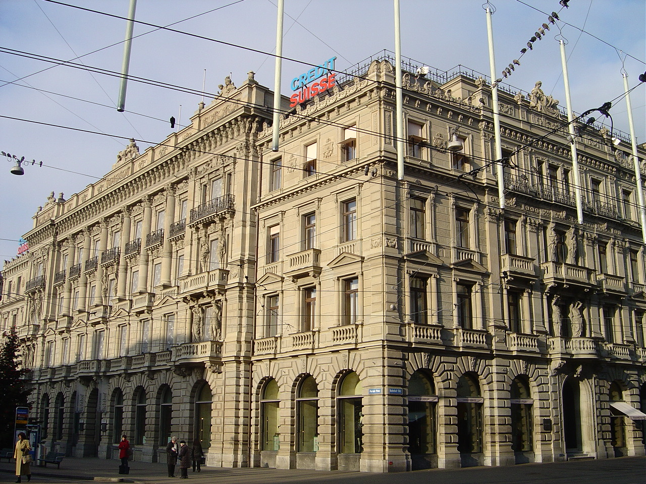 蘇黎世車站大街。